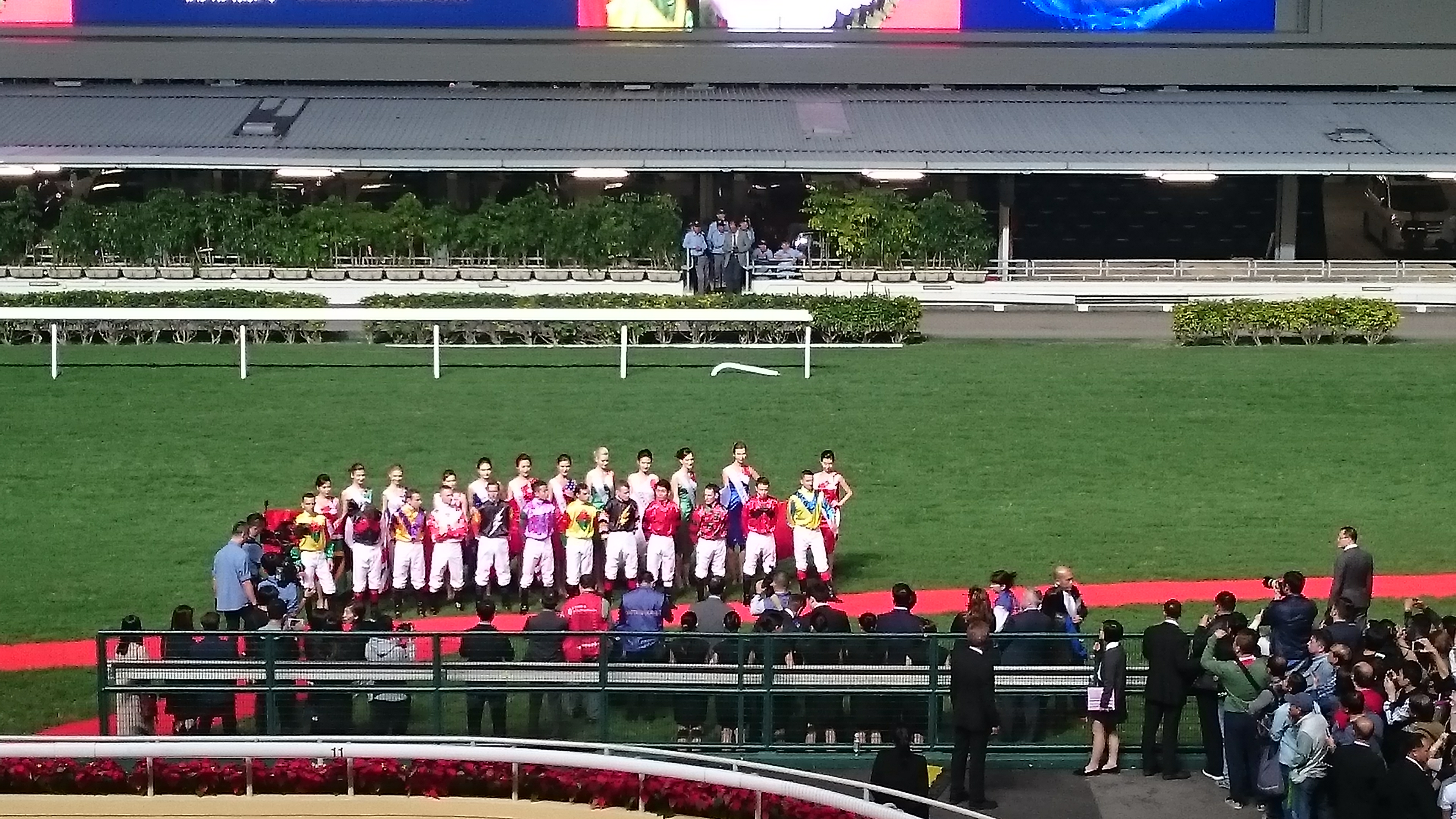 國際騎師錦標賽 2016 開幕煙花儀式